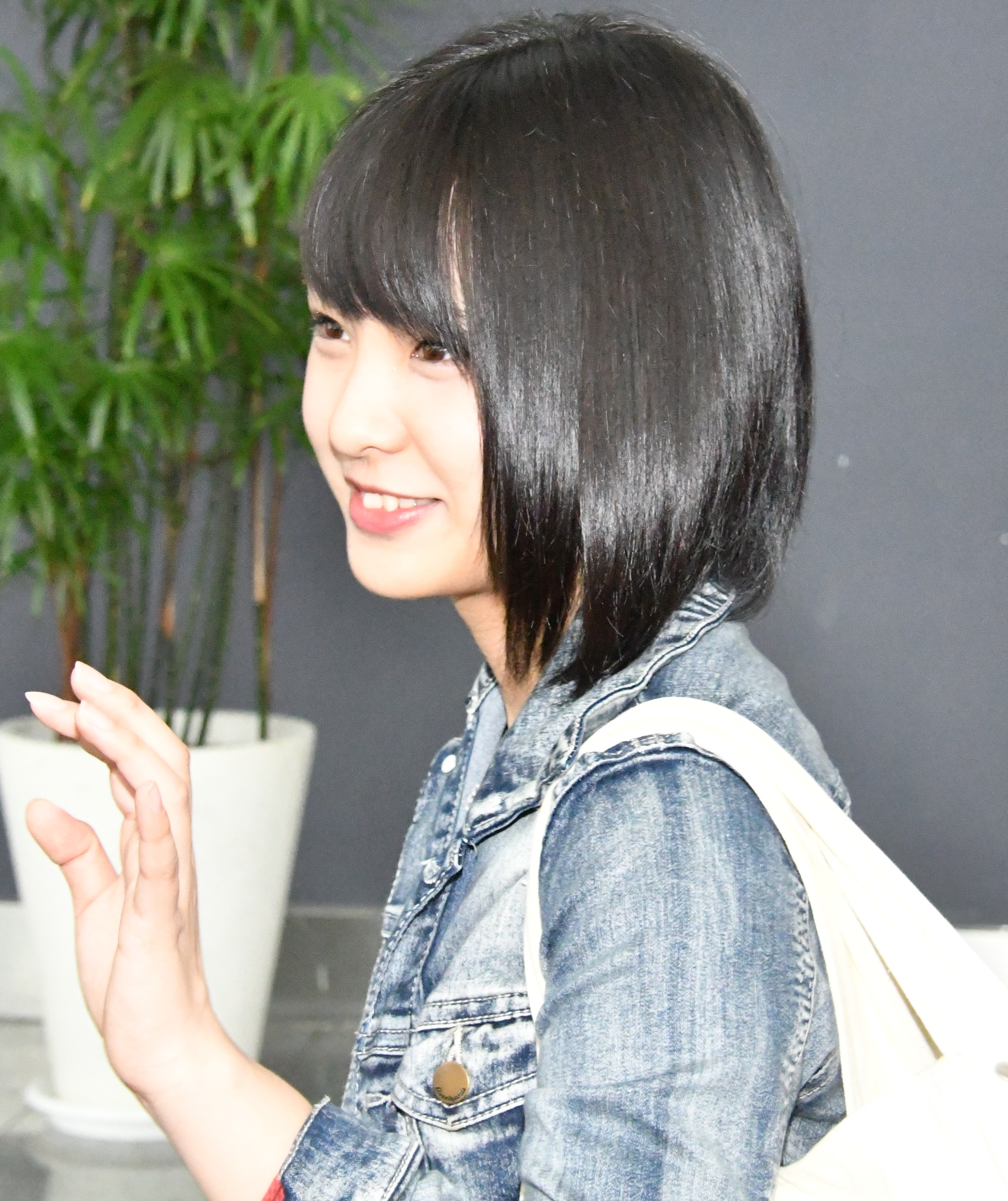 2017.04.30 AKB48 Team8 Fansmeeting in Taiwan 桃園縣機場 抵台